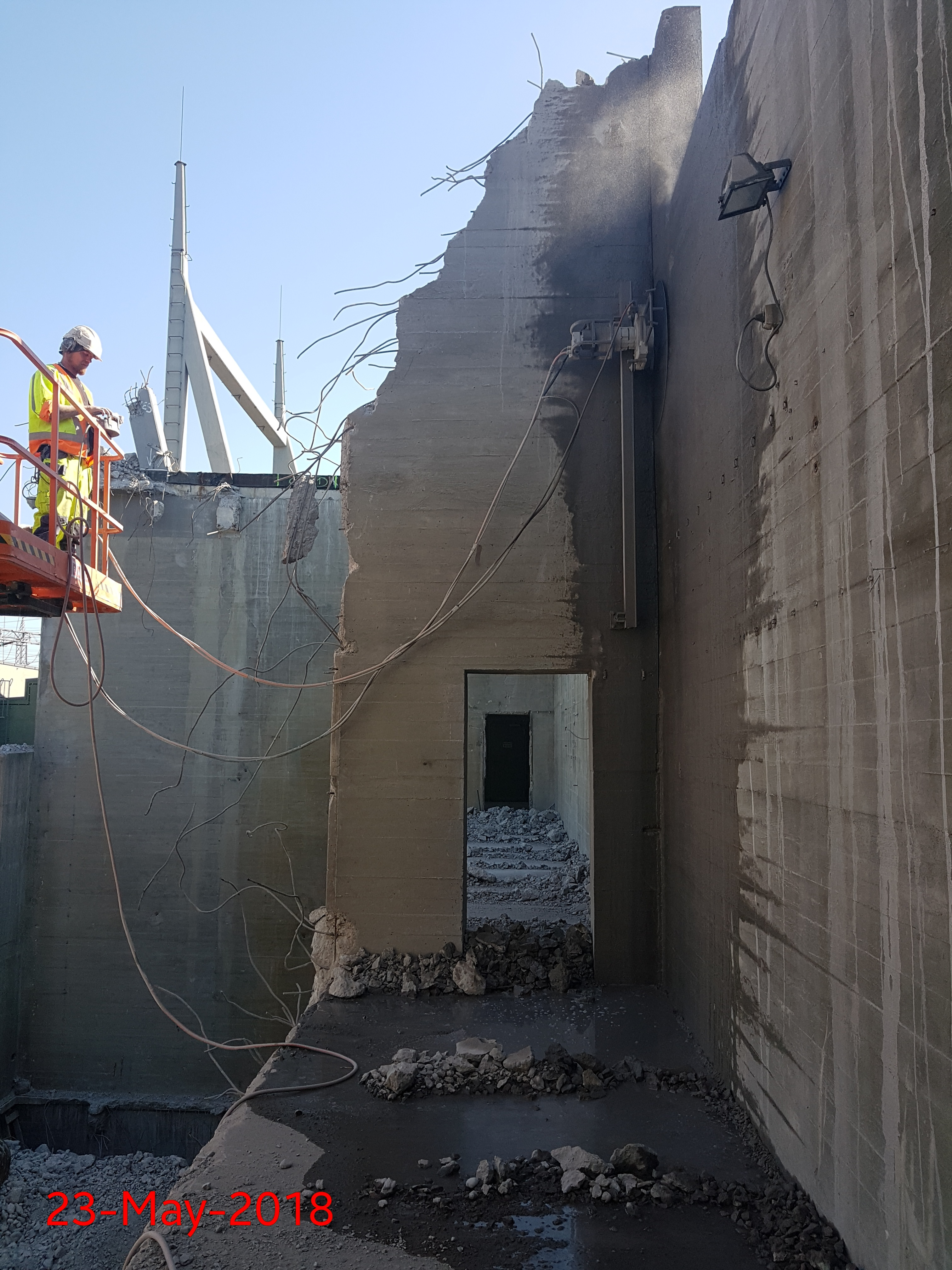 Betongsagig av 400mm tykk vegg fra bomlift